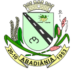 Brasão_Abadiânia_GO.gif